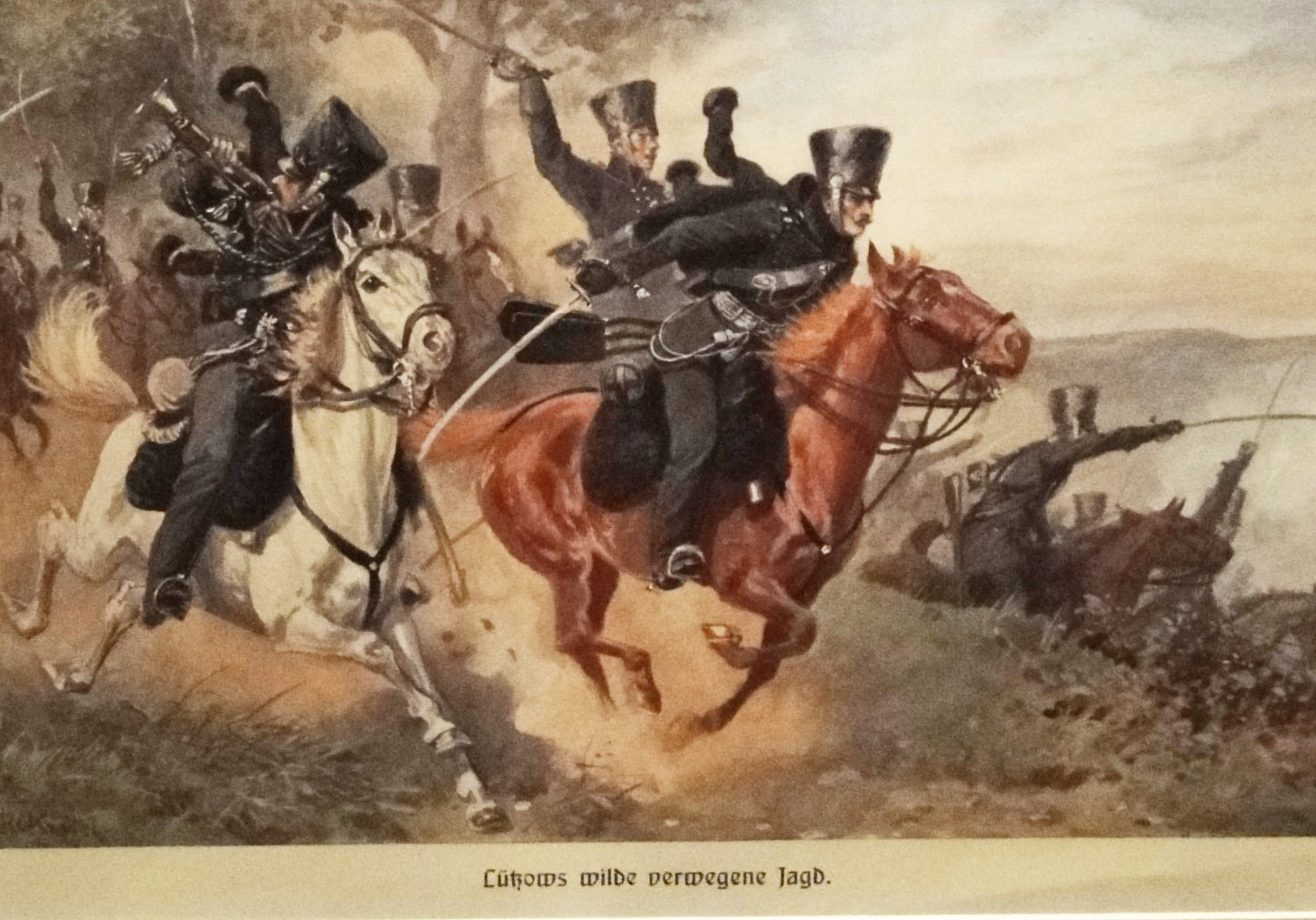 "Lützows verwegene Jagd" - Gemälde zum Befreiungskrieg 1813-15 mit Teilnehmern aus Mecklenburg.